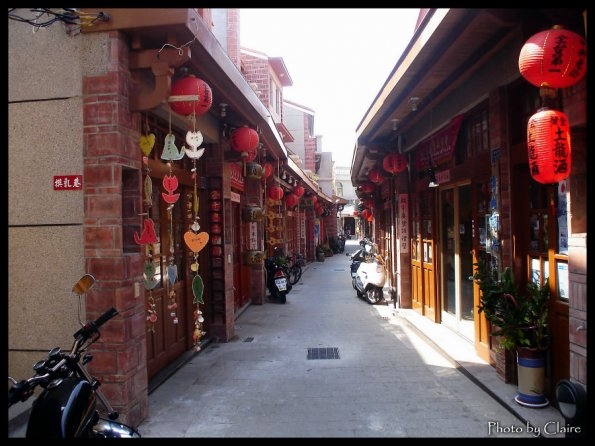 Rue de Makung, Penghu, archipel de Taiwan